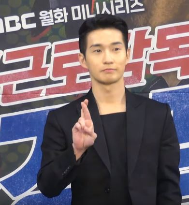 8일 오후 서울시 마포구 상암동 MBC 골든마우스홀에서 MBC 새 월화드라마 '특별감독관 조장품' 제작발표회가 열려 배우 김동욱X류덕환X박세영X설인아X김경남이 포토타임을 갖고 있다.